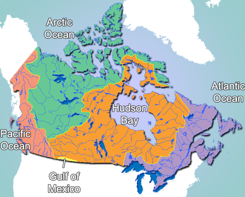 Canada drainage basins